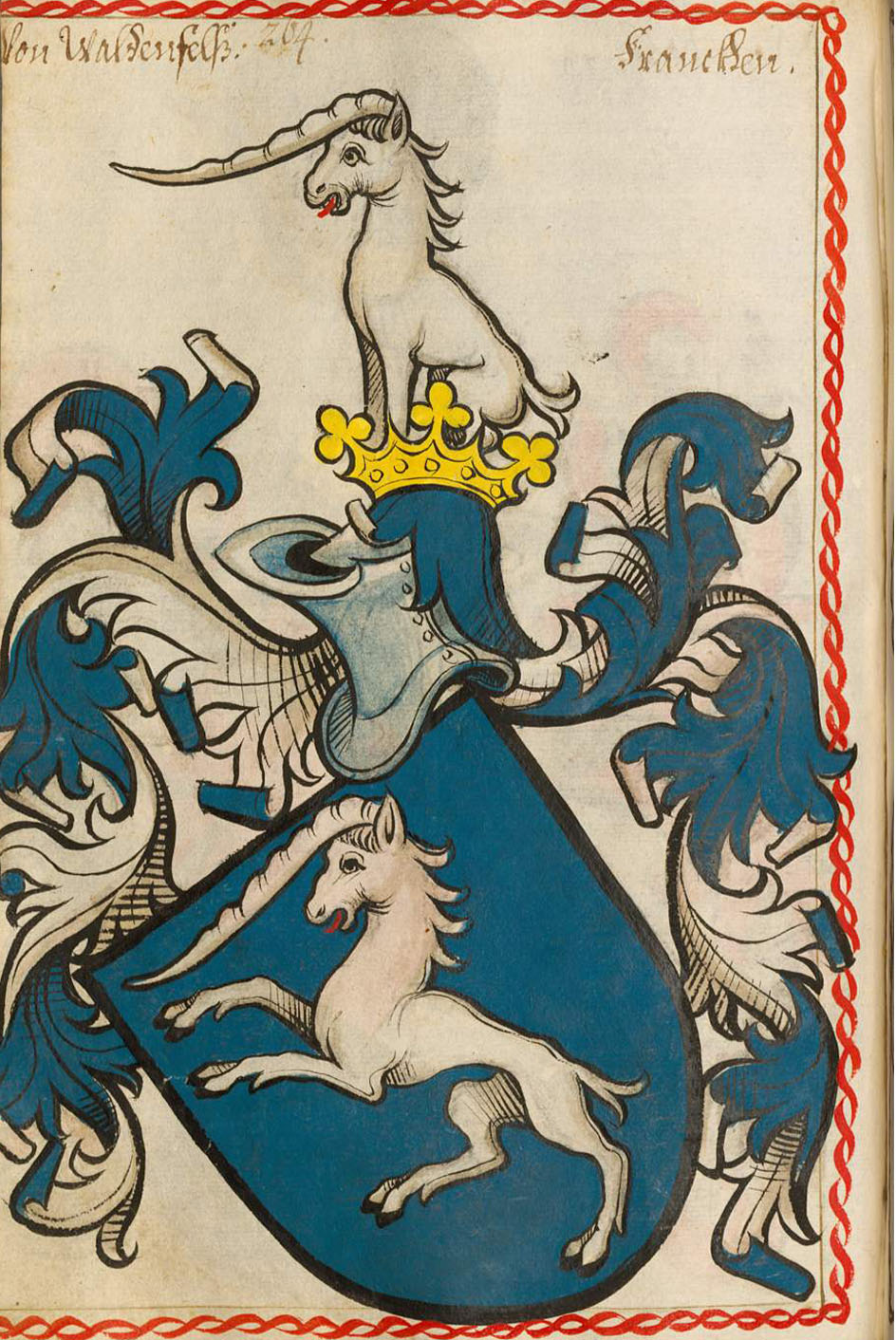 Scheibler'sches Wappenbuch, älterer Teil Weidenfels (Waldenfels)